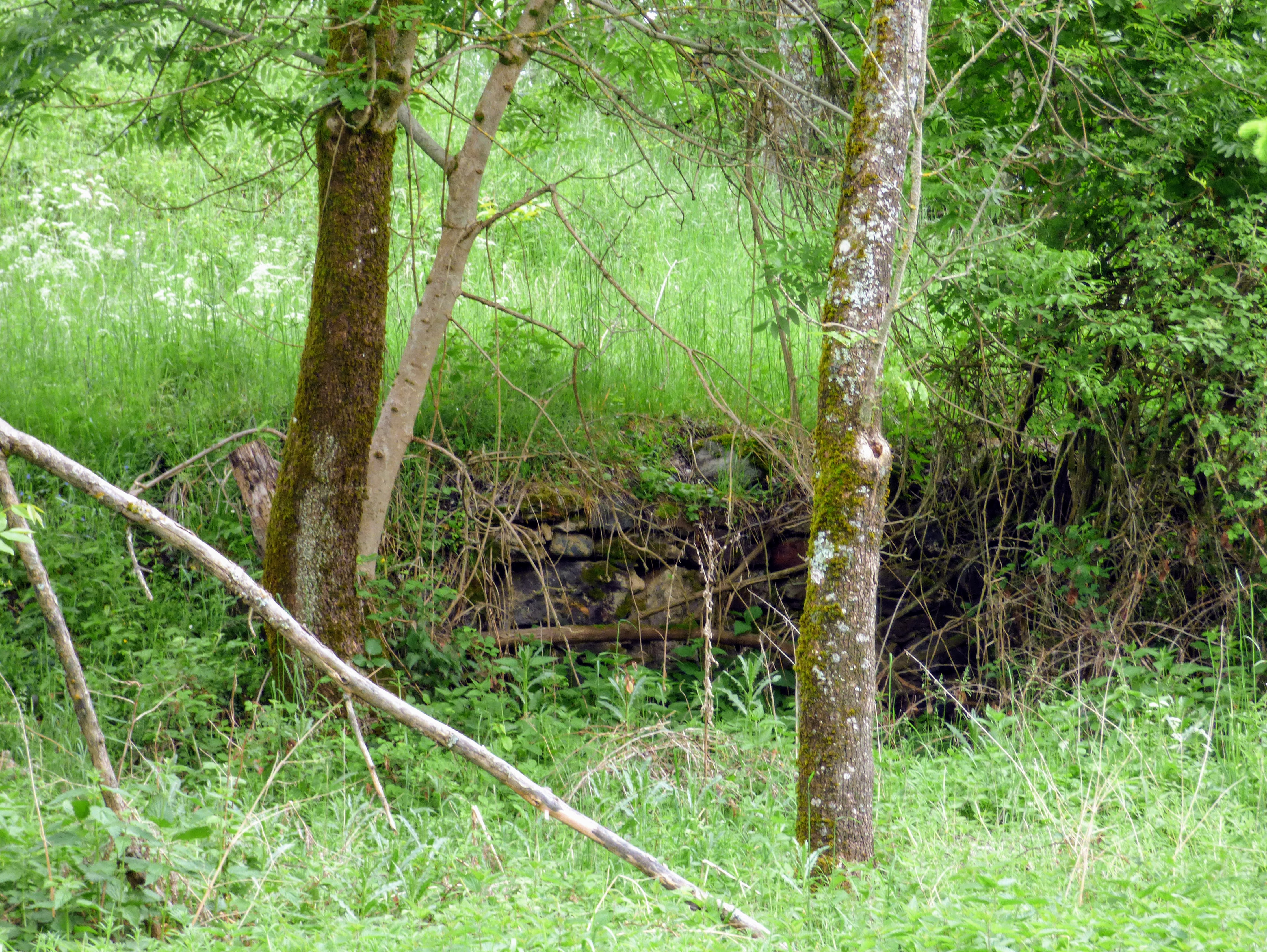 Ruine des verfallenen Hofes Prilitz, Prikalitz (Gemeinde St. Veit an der Glan)